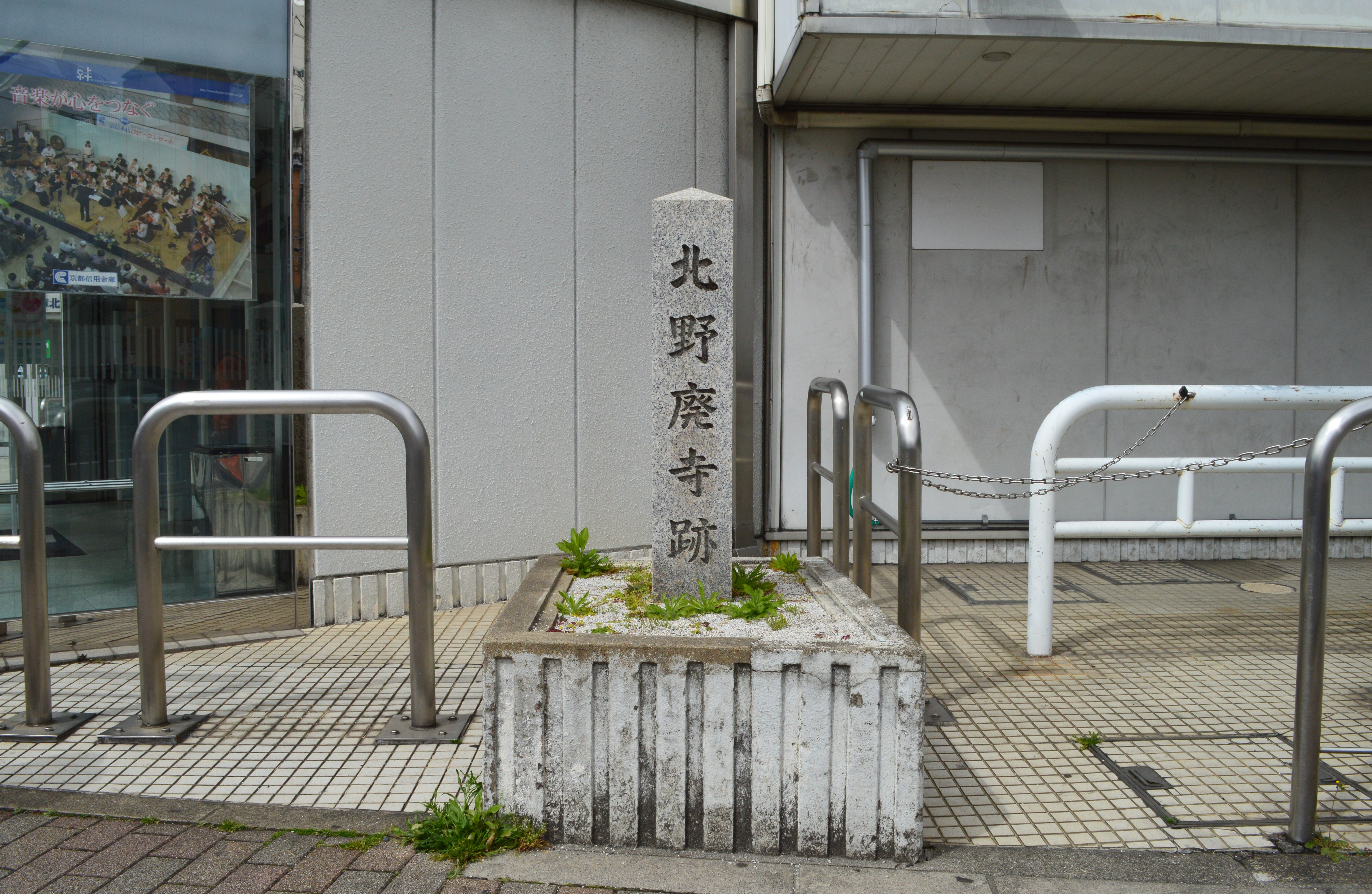 北野廃寺跡 石碑